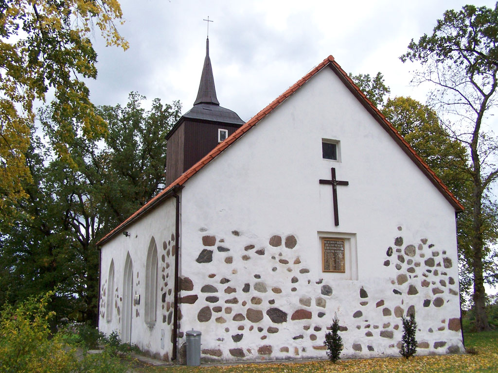 Danowo - kościół p.w. Matki Boskiej Częstochowskiej, 1601